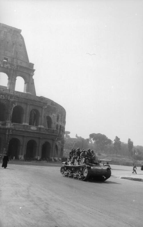 Information added by Wikimedia users.* Carro armato nazista di fronte al Colosseo a Roma, nel 1944.